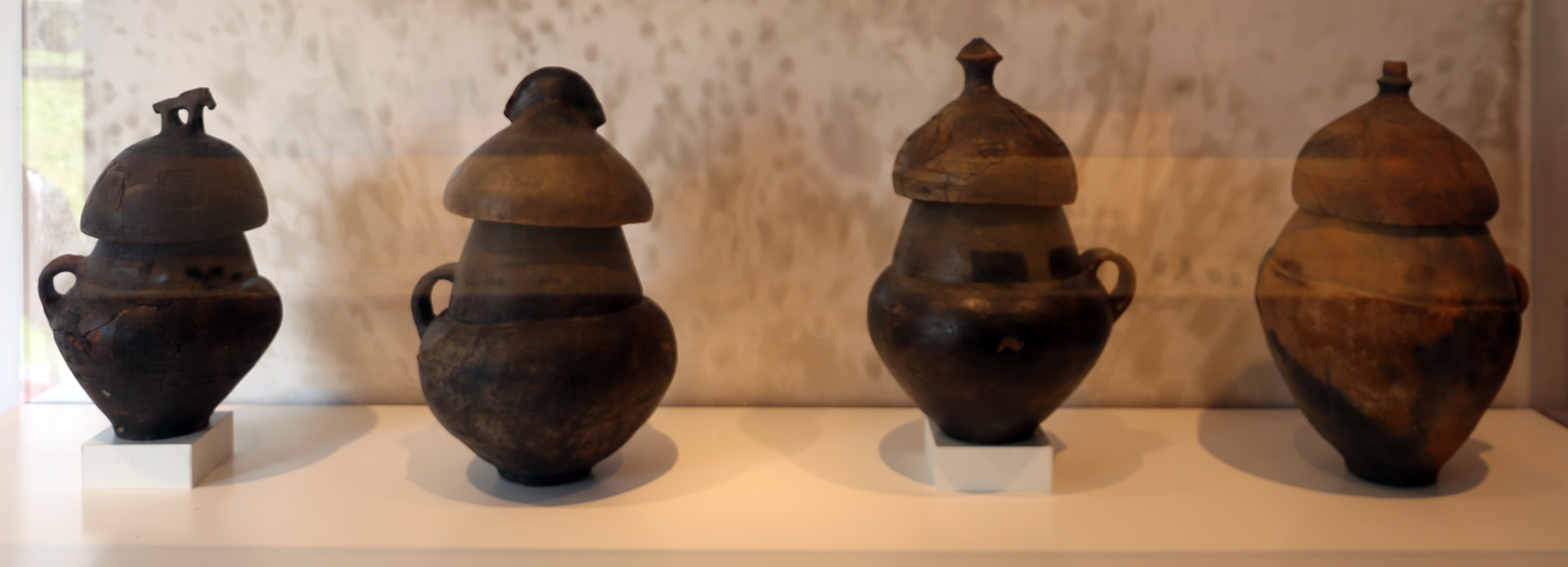 Palestra Grande This is a photo of a monument which is part of cultural heritage of Italy.